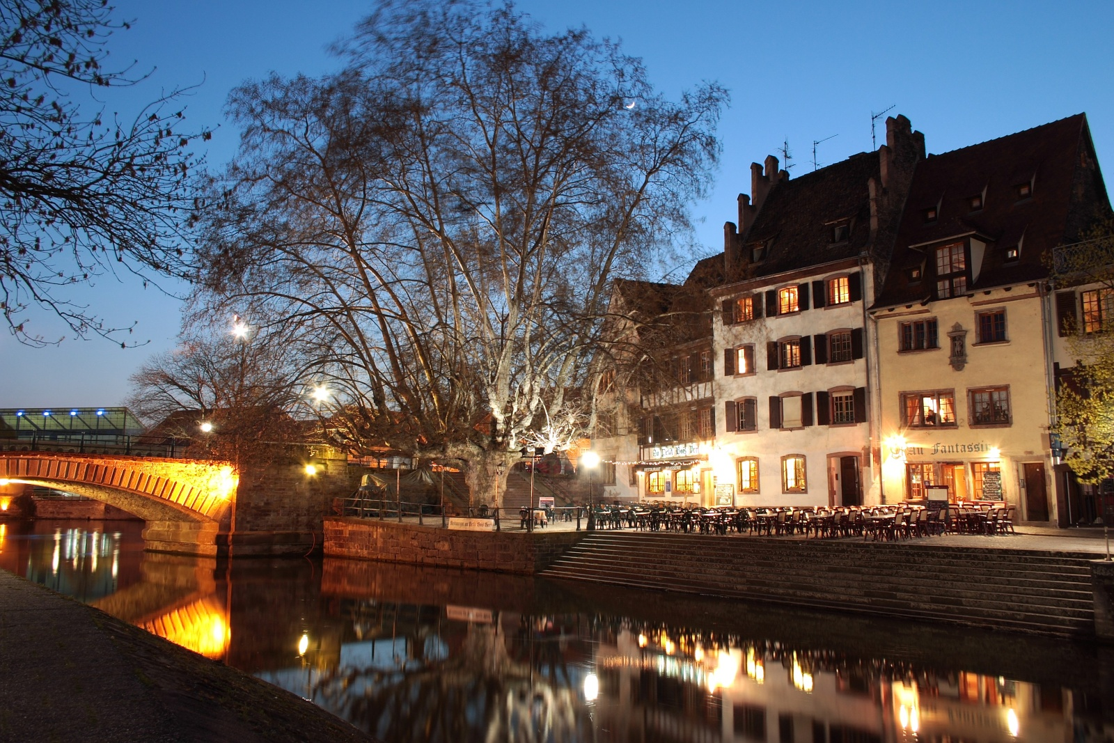 Quai de l'Ill à Strasbourg, dans la petite France, à côté des ponts couverts.